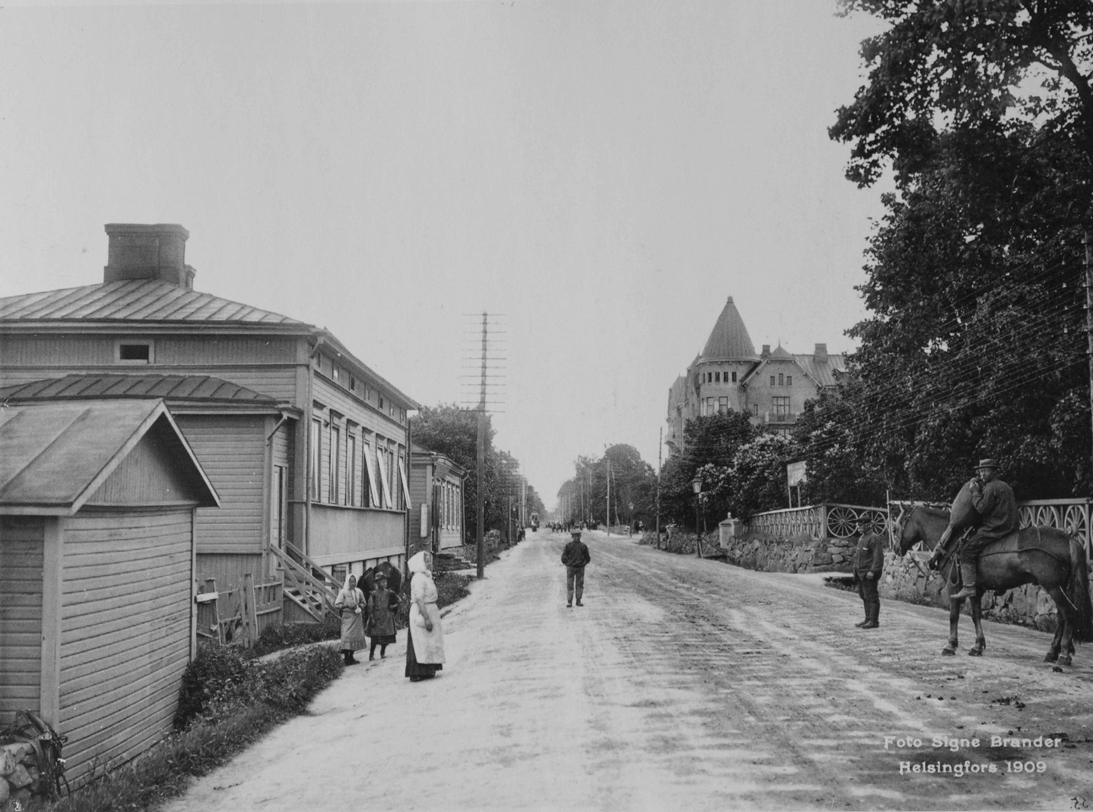 Läntinen Viertotie vuonna 1909, nykyinen Mannerheimintie 76-80 ja 33-31 kohdalla.